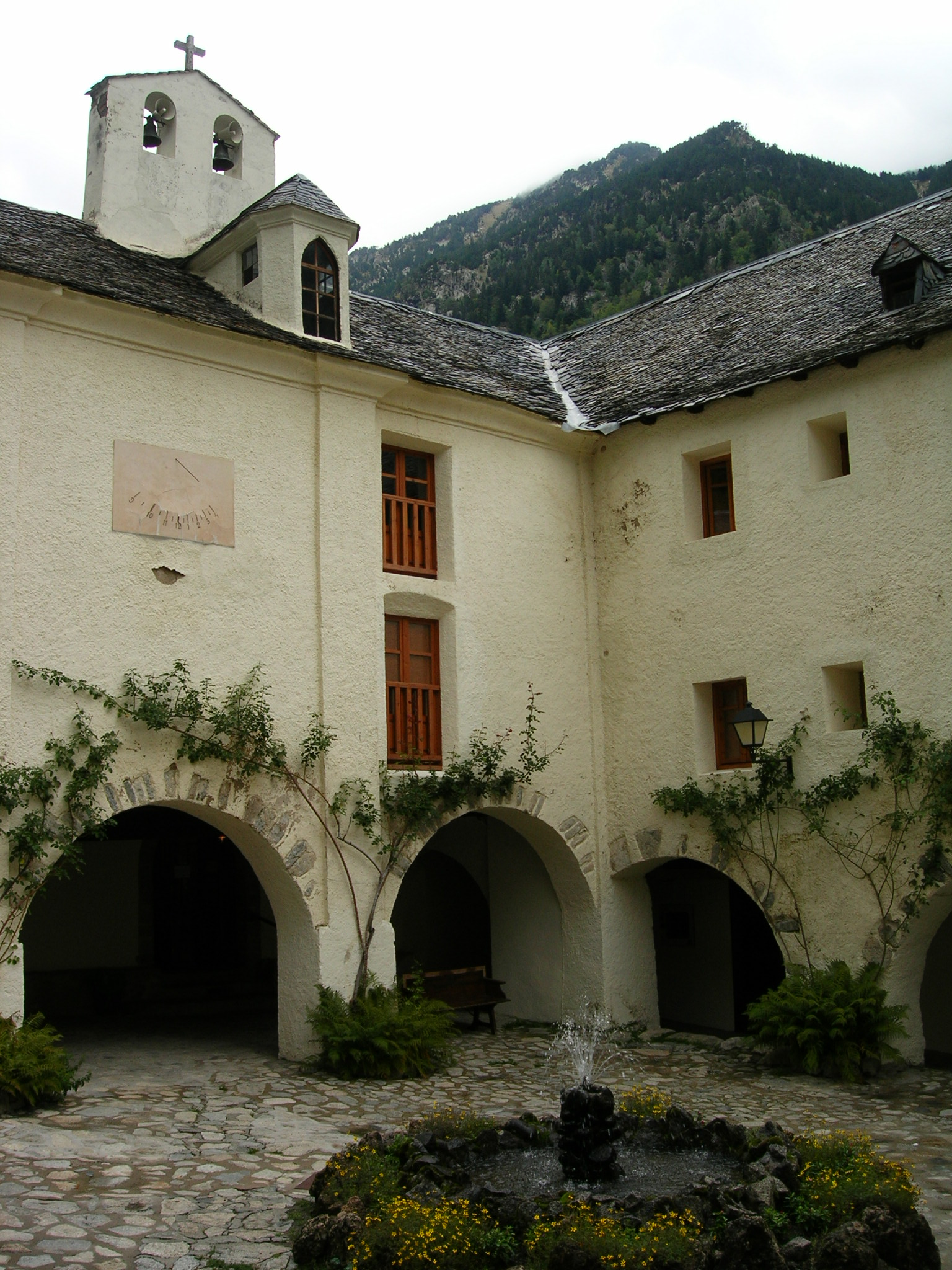 Balneari de Caldes de Boí (la Vall de Boí)